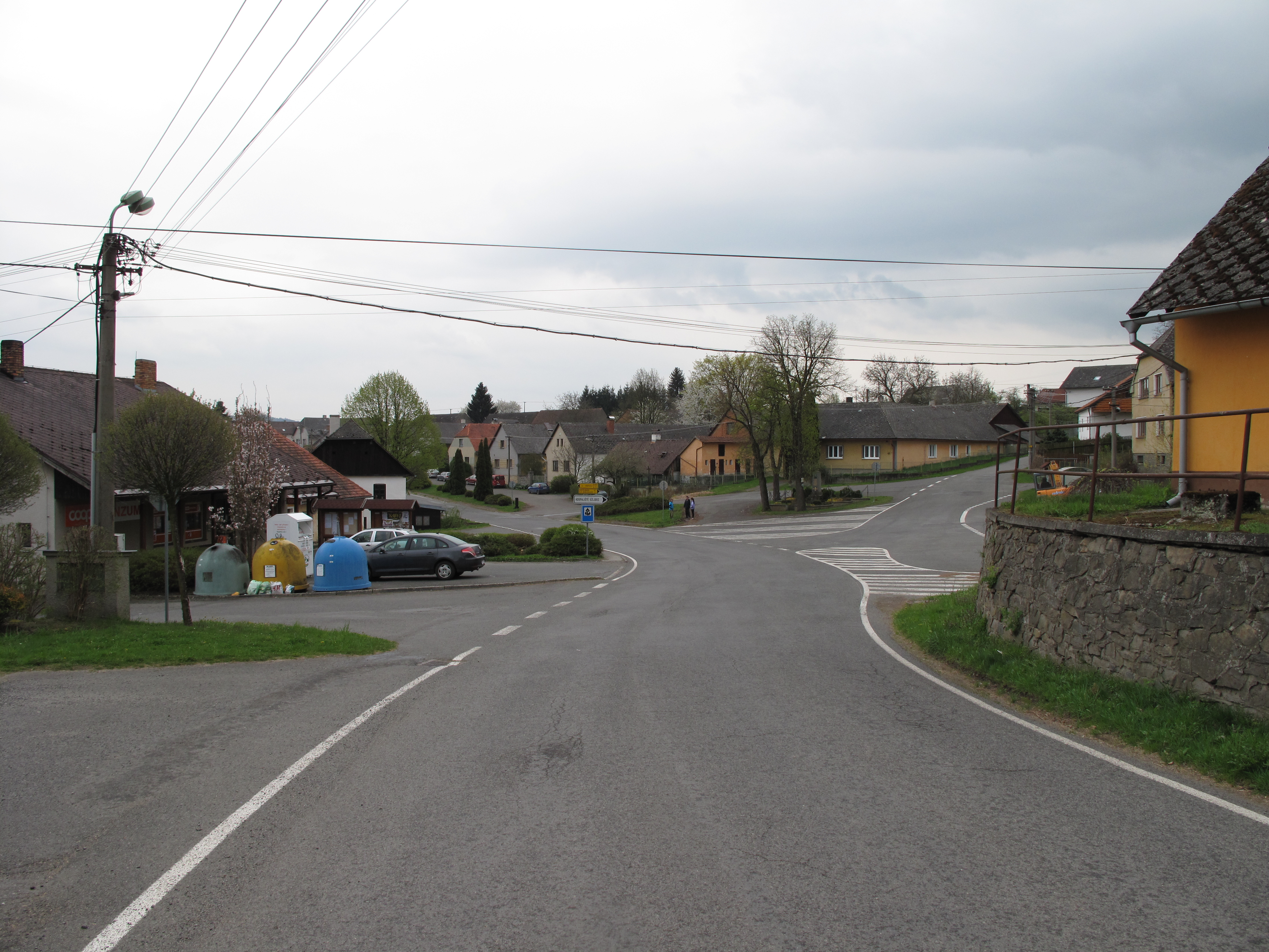 Černíkov. Okres Klatovy, Česká republika.